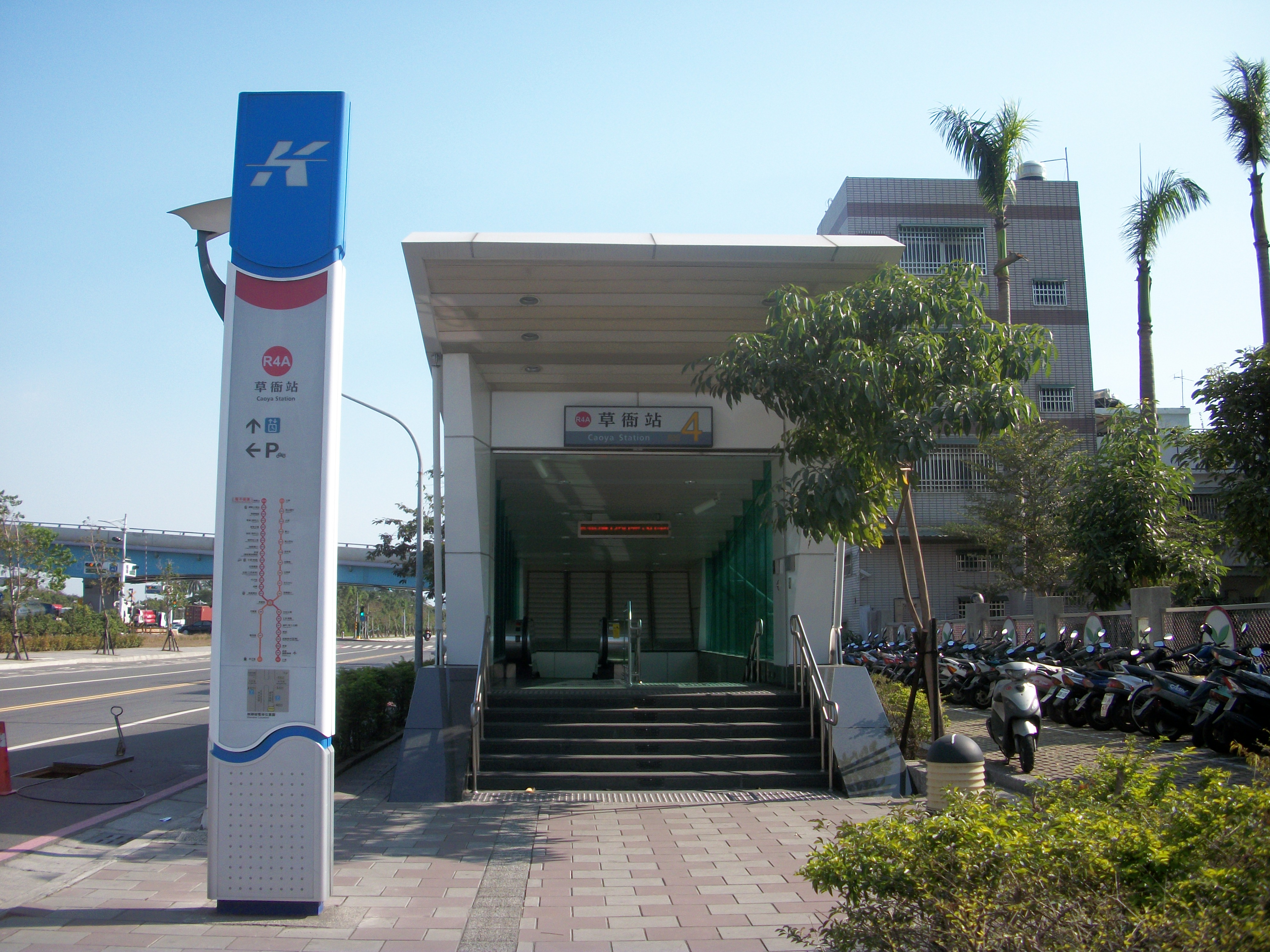 中文（台灣）: 高雄捷運紅線草衙站四號出口